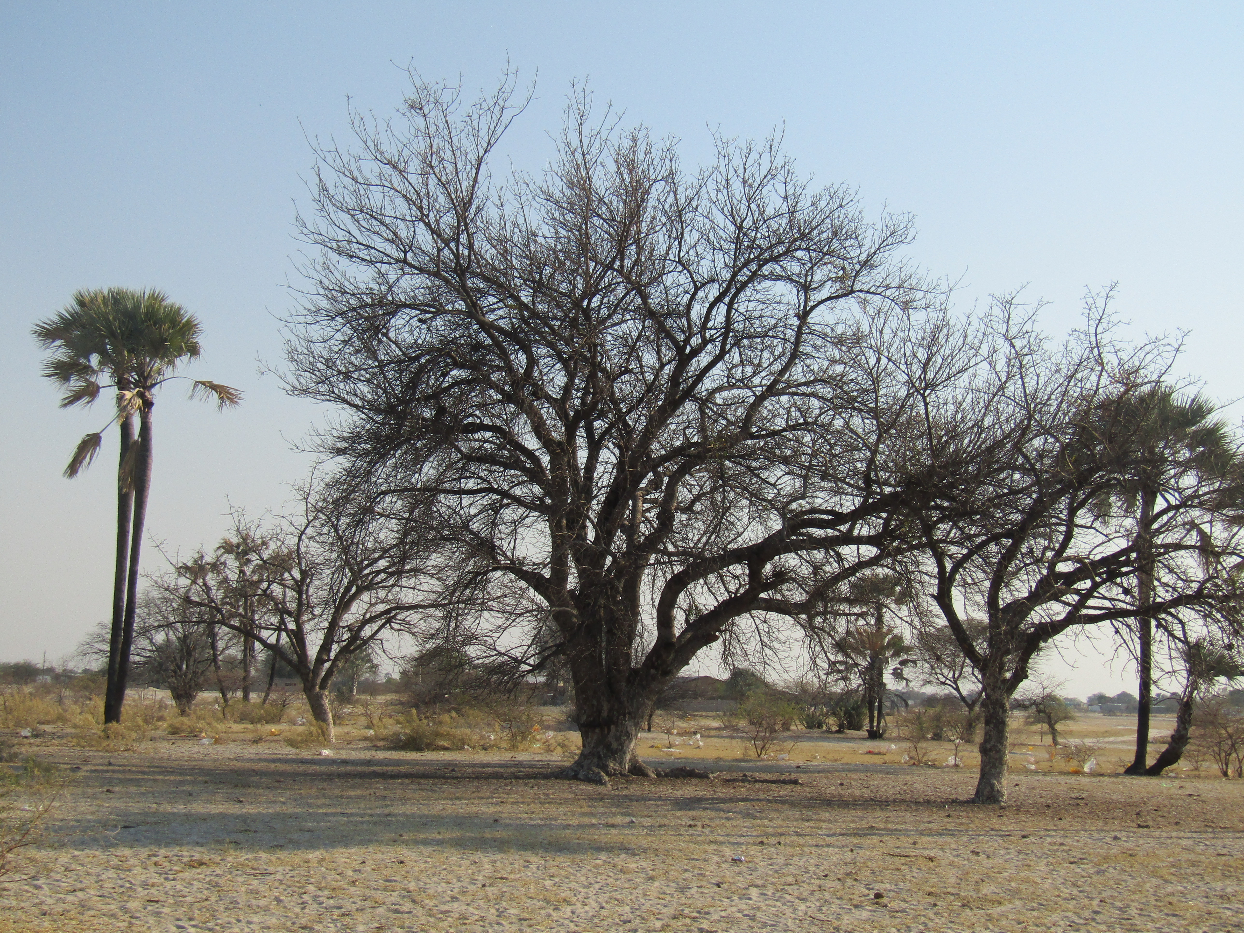 Maroelaboom laatwinter in Namibië, met die loof gewissel